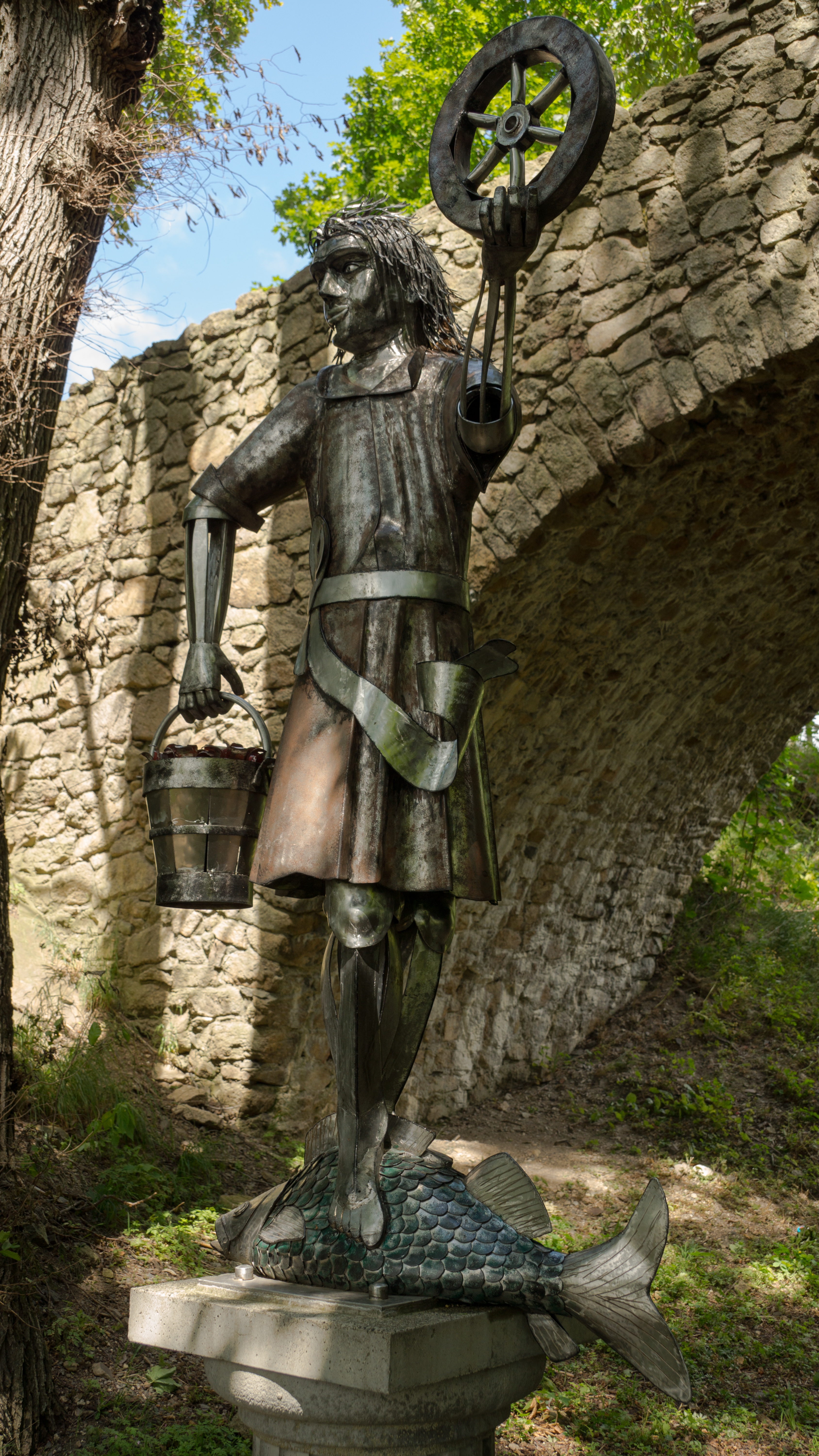 Die Krodo-Figur am Großen Burgberg in Bad Harzburg